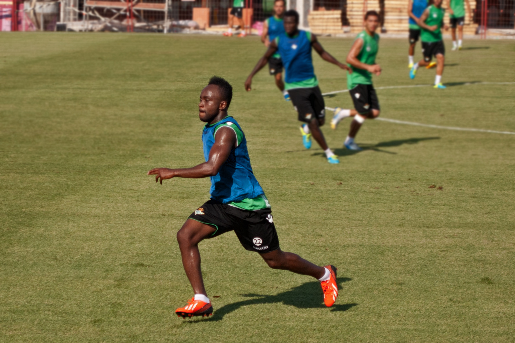 Cedric Mabwati Gerard, futbolista.